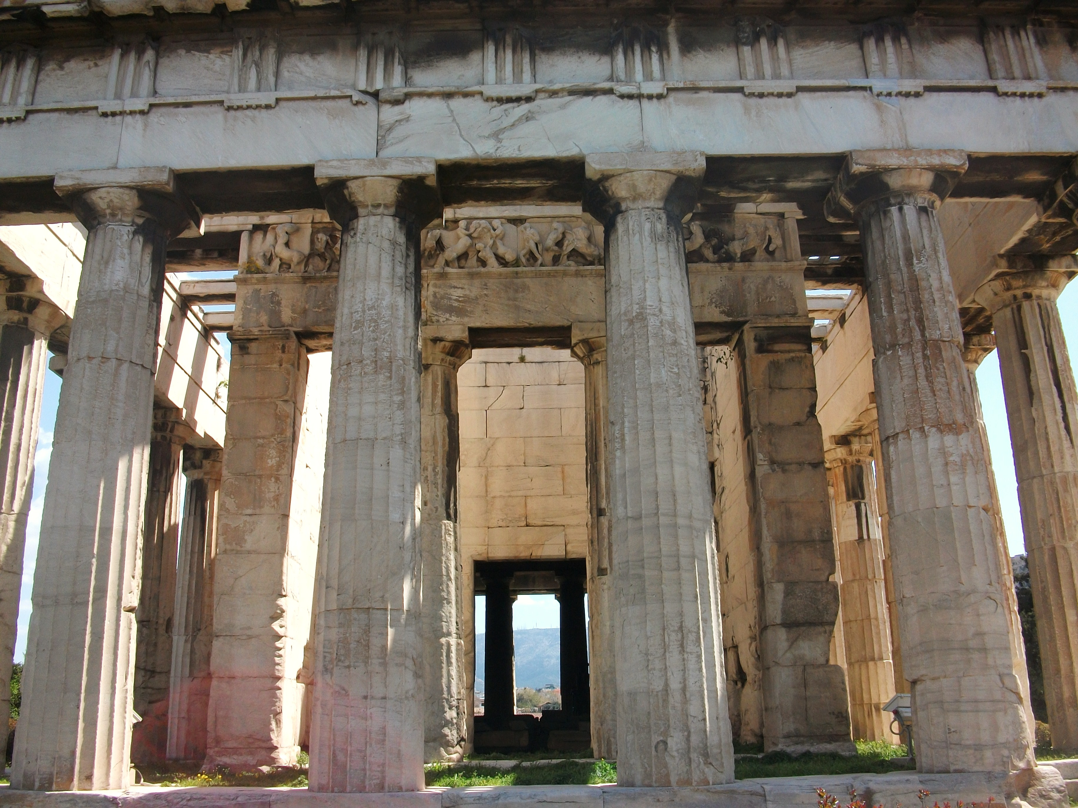 Vista frontal del temple d'Hefest (àgora d'Atenes).